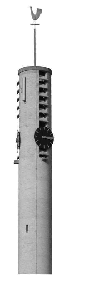 Foto van de Toren Magere Josje te Boxtel